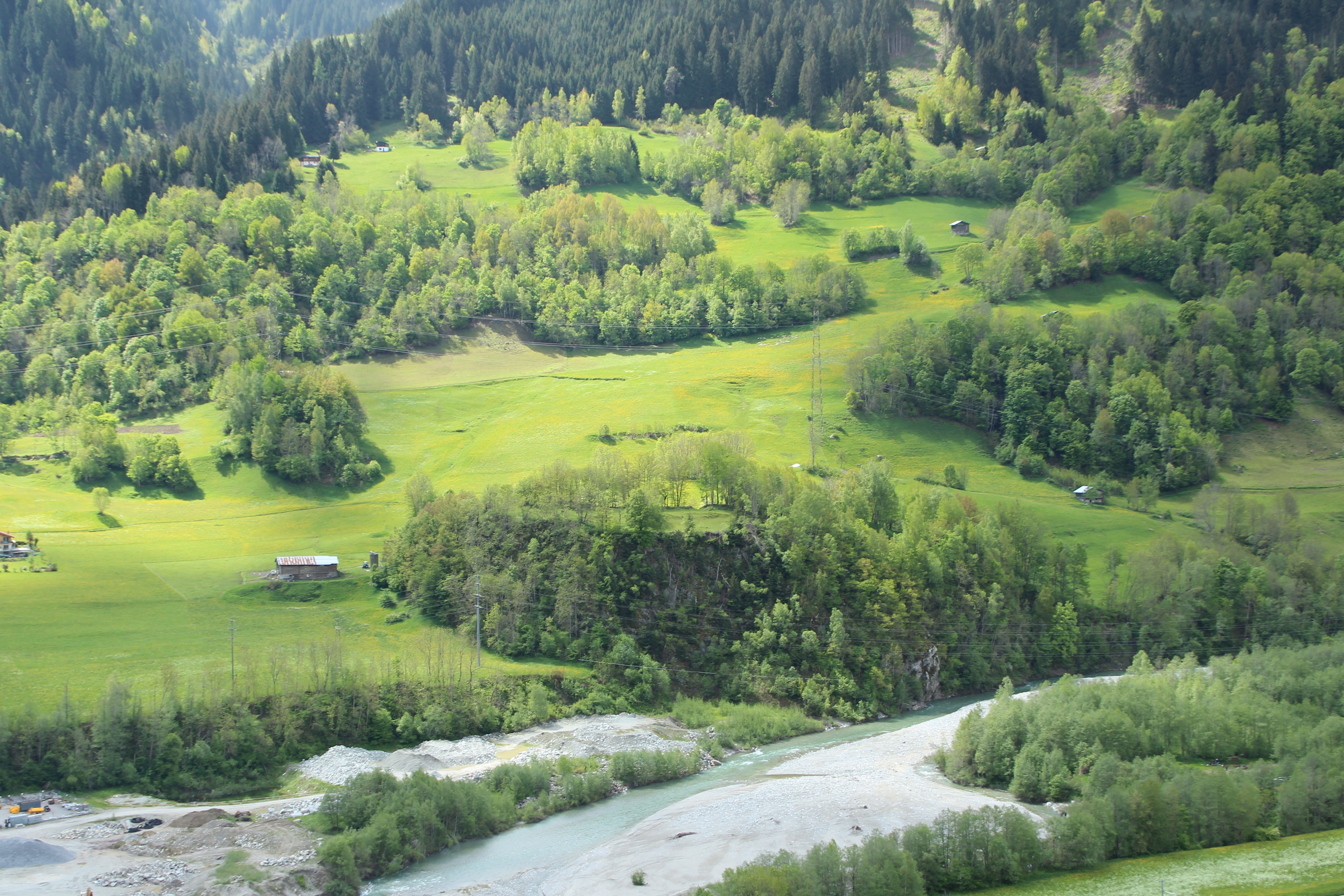 von Nordosten